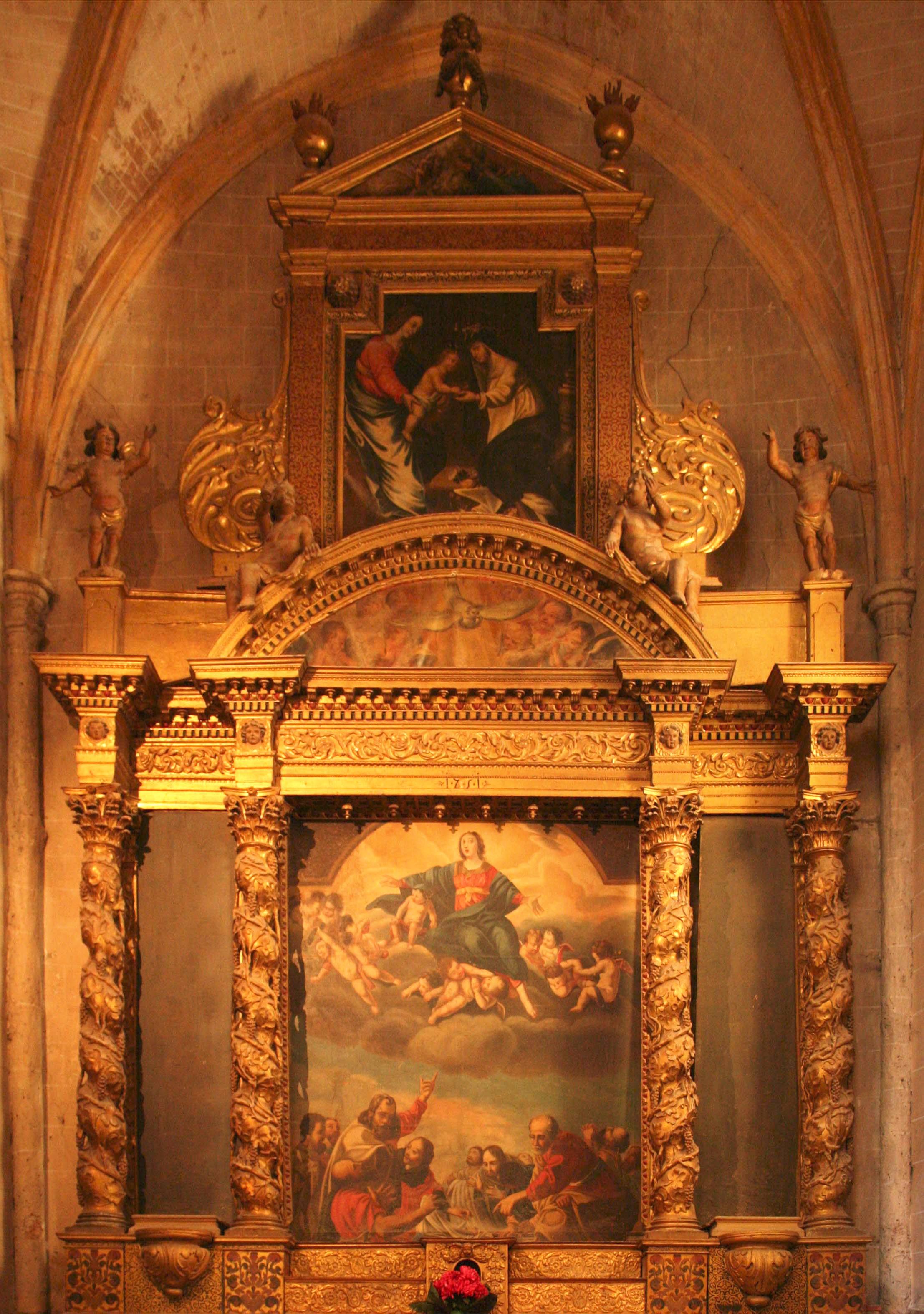 Rétable de l'Assomption dans la chapelle du même nom dans la basilique de Saint-Maximin dans le département du Var.